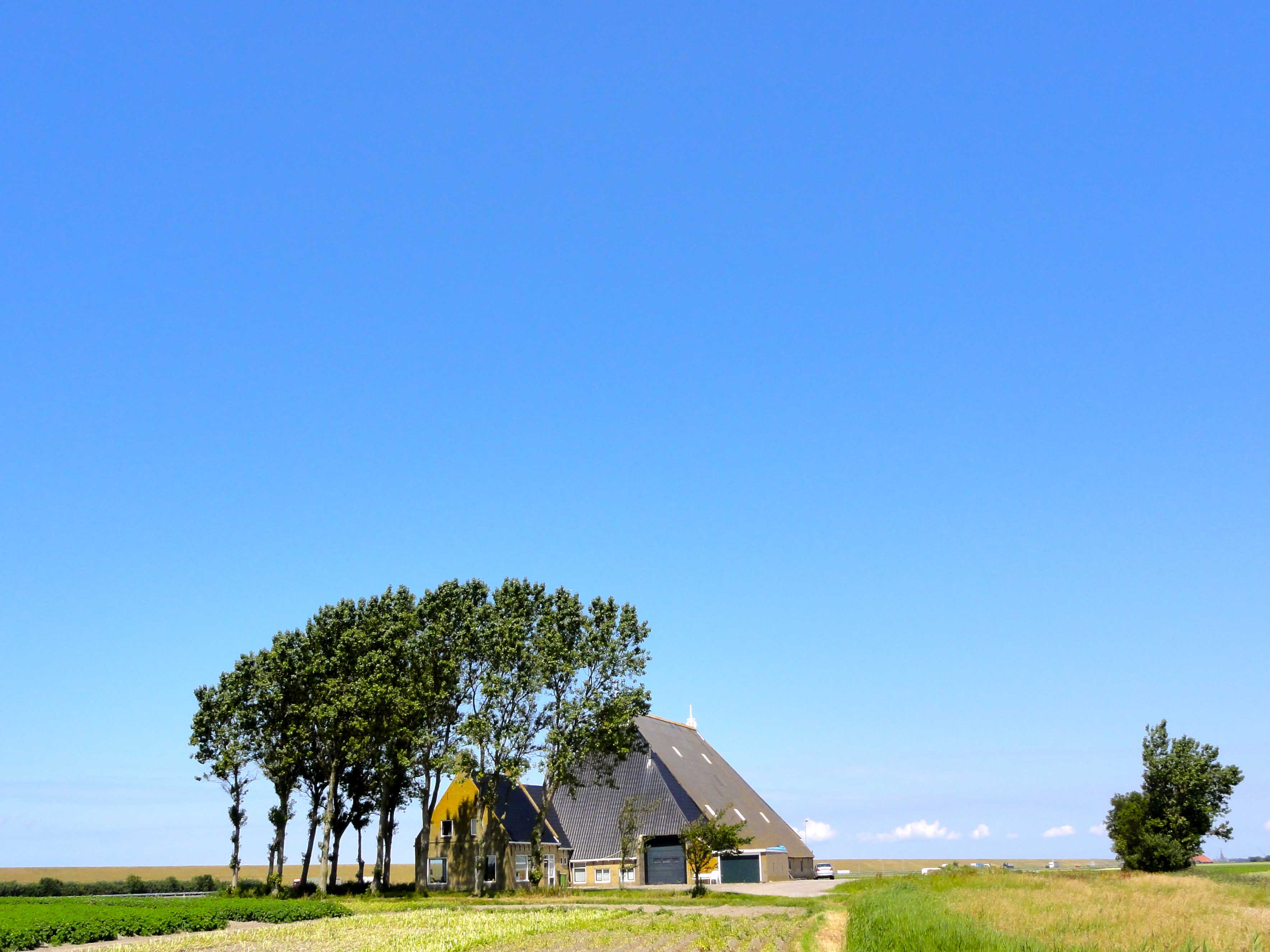 Boerderij Vinea Domini in Strand nabij Pingjum in Friesland